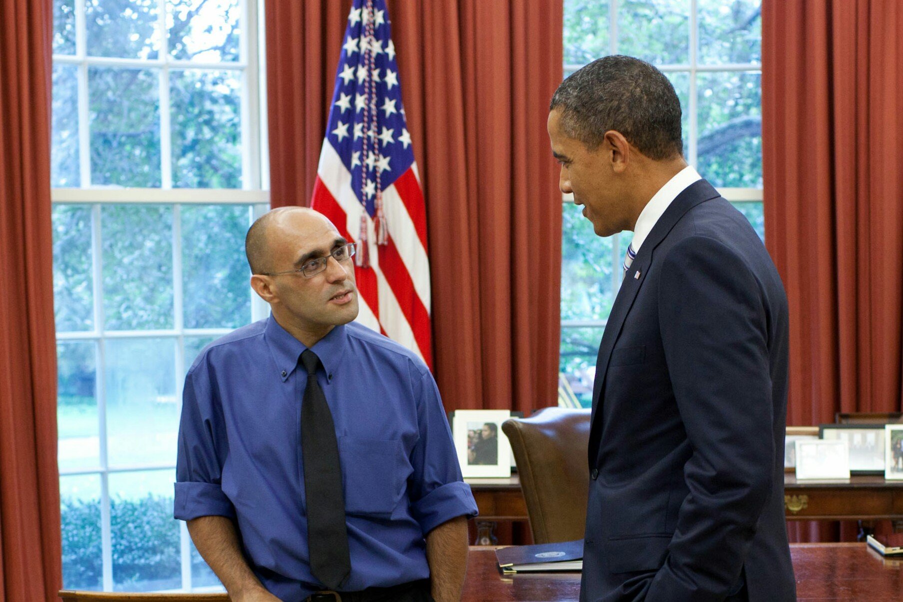 President Barack Obama talks with New York Times photojournalist Joao Silva in the Oval Office, Sept. 15, 2011. Silva lost both his legs when he stepped on a mine while accompanying U.S. soldiers on patrol near the town of Arghandab, in southern Afghanistan, Oct. 23, 2010, and was at the White House on assignment to photograph Dakota Meyer receiving the Medal of Honor. (Official White House Photo by Pete Souza)